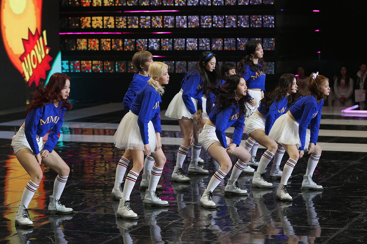 모모랜드(MOMOLAND) 평창 동계올림픽 G-10 특집 생방송